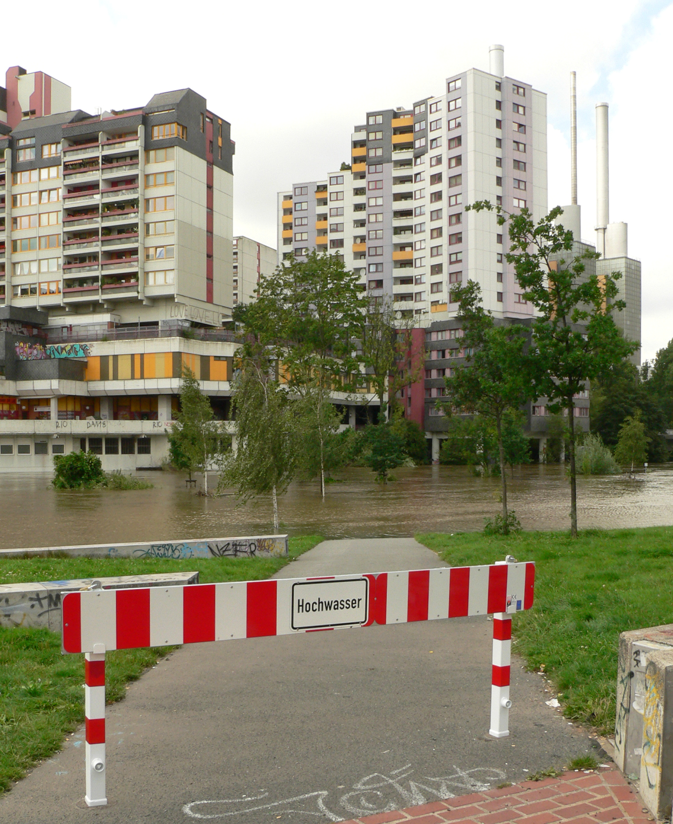 Hochwasser am Ihmezentrum